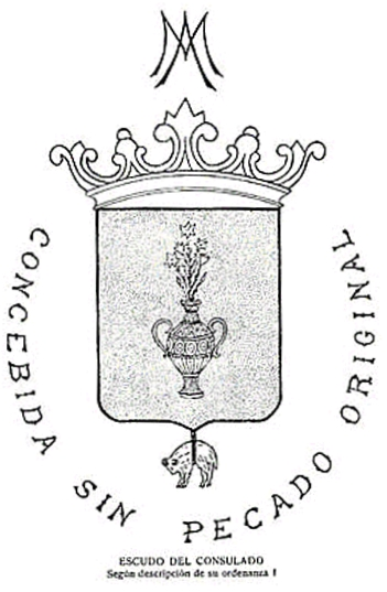 Escudo del Tribunal del Consulado de Lima, creado en 1593 y instalado en 1613